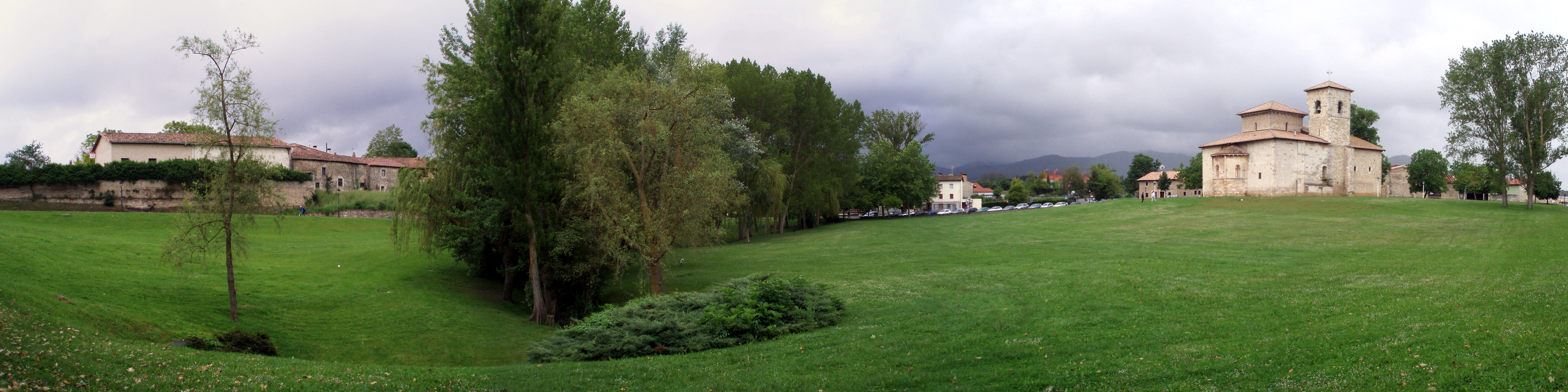 Armentiako basilika eta inguruetako larreak.